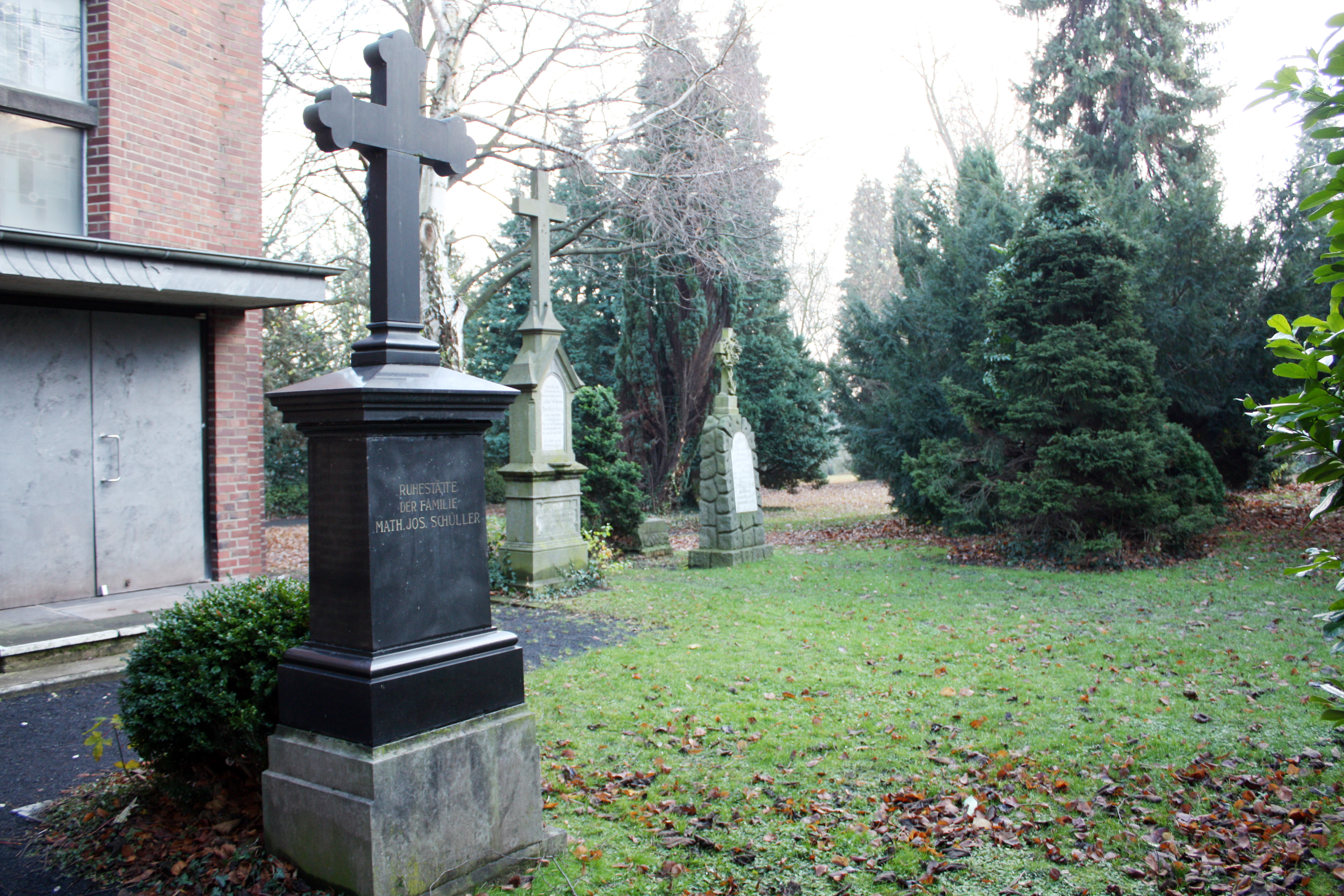 Hürth-Fischenich, alte Grabsteine auf dem Gelände des ehemaligen Kirchhofes